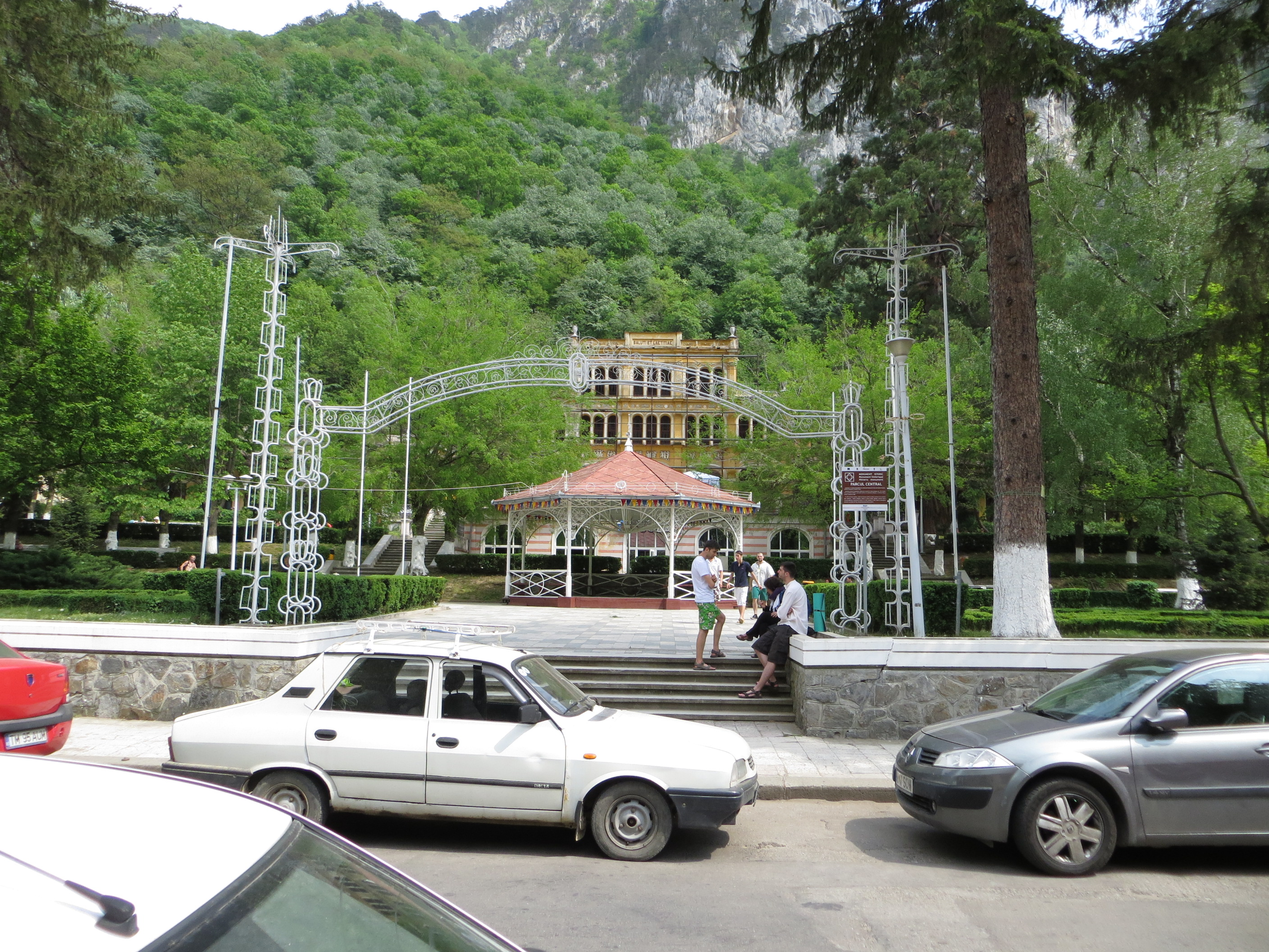 Parcul Cazinoului 02